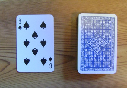 trumf+bunke til kortartikel